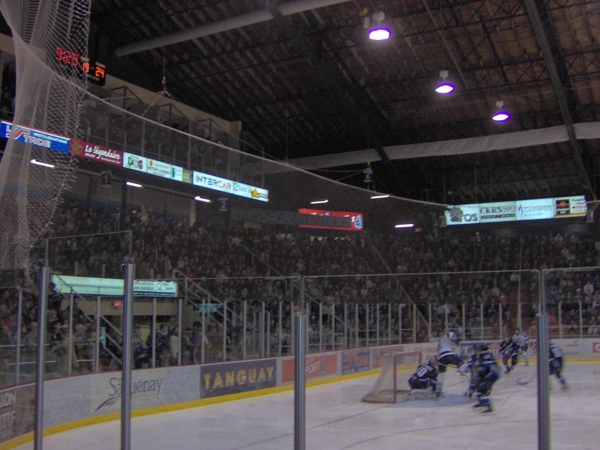 Loges du centre Georges-Vézina, Chicoutimi, Québec, Canada Photo prise le 27 avril 2006 Match demi-finale Saguenéens de Chicoutimi contre l'Océanic de Rimouski.